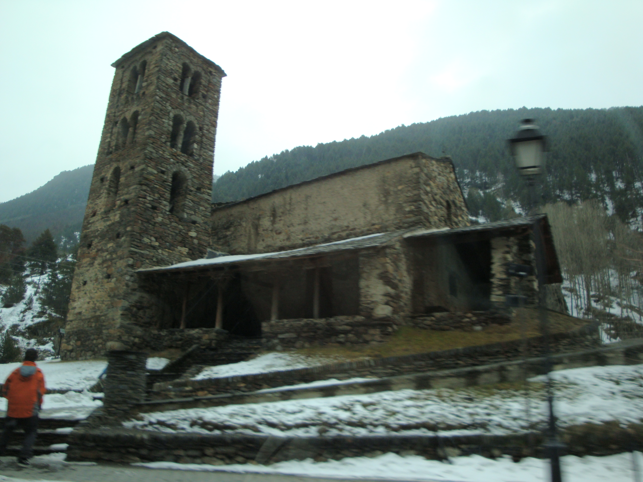 Iglesia antigua andorrana